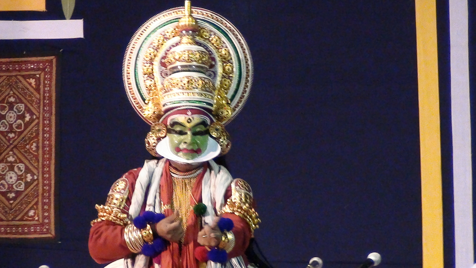 கேரளத்தின் பாரம்பரிய நடனமான கதகளி நடனம்.